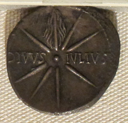 Palazzo Massimo alle Terme